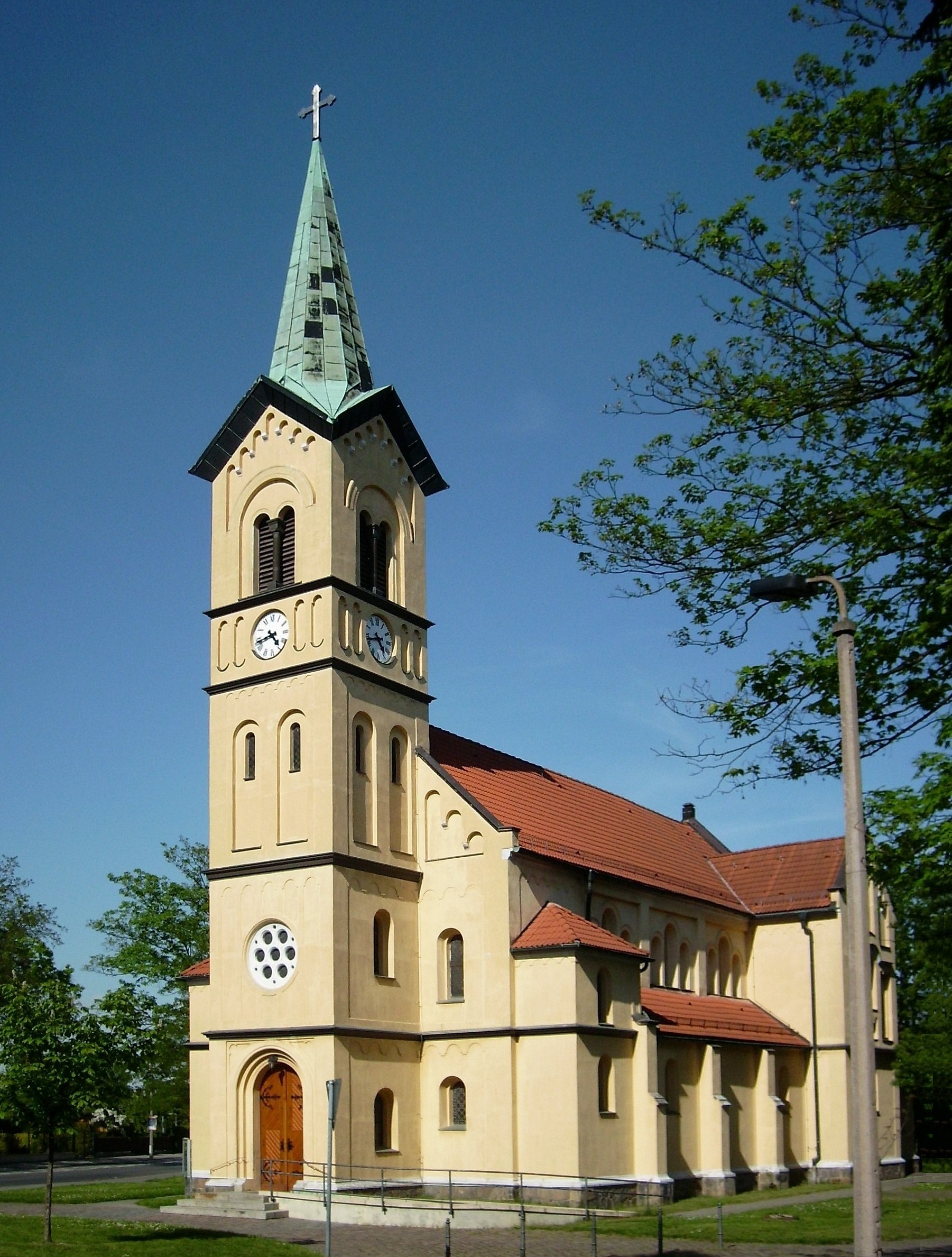 Katholische Herz-Jesu-Kirche in Wurzen